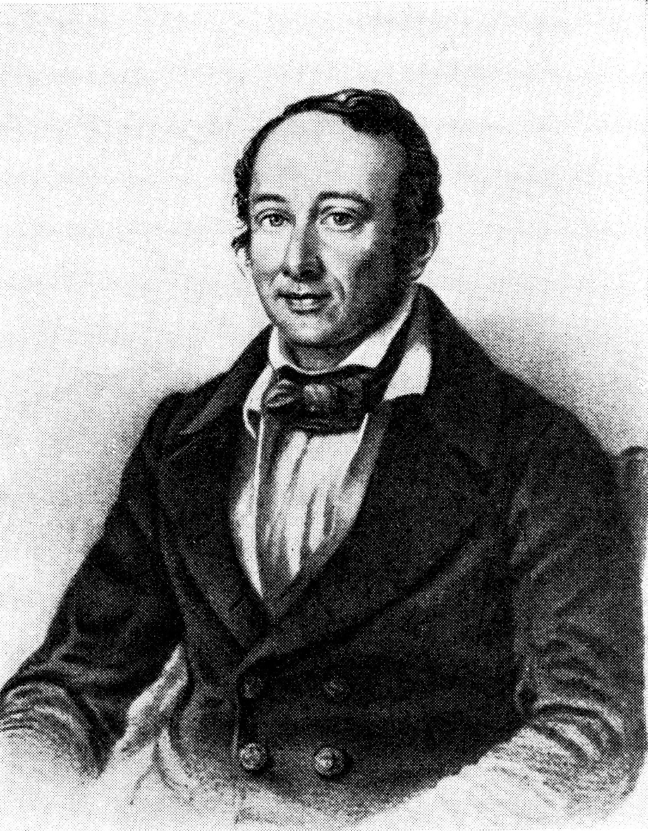 Picture of Swiss-born Russian chemist Germain Henri Hess (* 7. August 1802 in Genf; † 30. Novemberjul./ 12. Dezember 1850greg. in Sankt Petersburg).